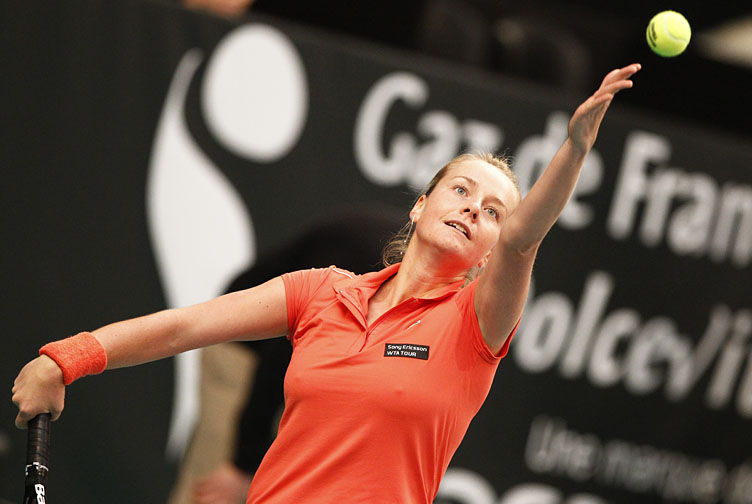 Zuzana Kučová (SLO), qualifications, 2e tour, Open Gaz de France Suez, stade Pierre de Coubertin, Paris, dimanche 7 février 2010.